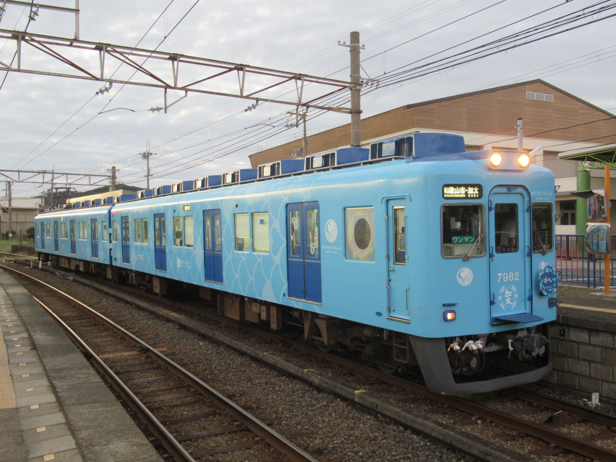 南海電気鉄道 7962 めでたいでんしゃ 「かい」 二里ヶ浜駅